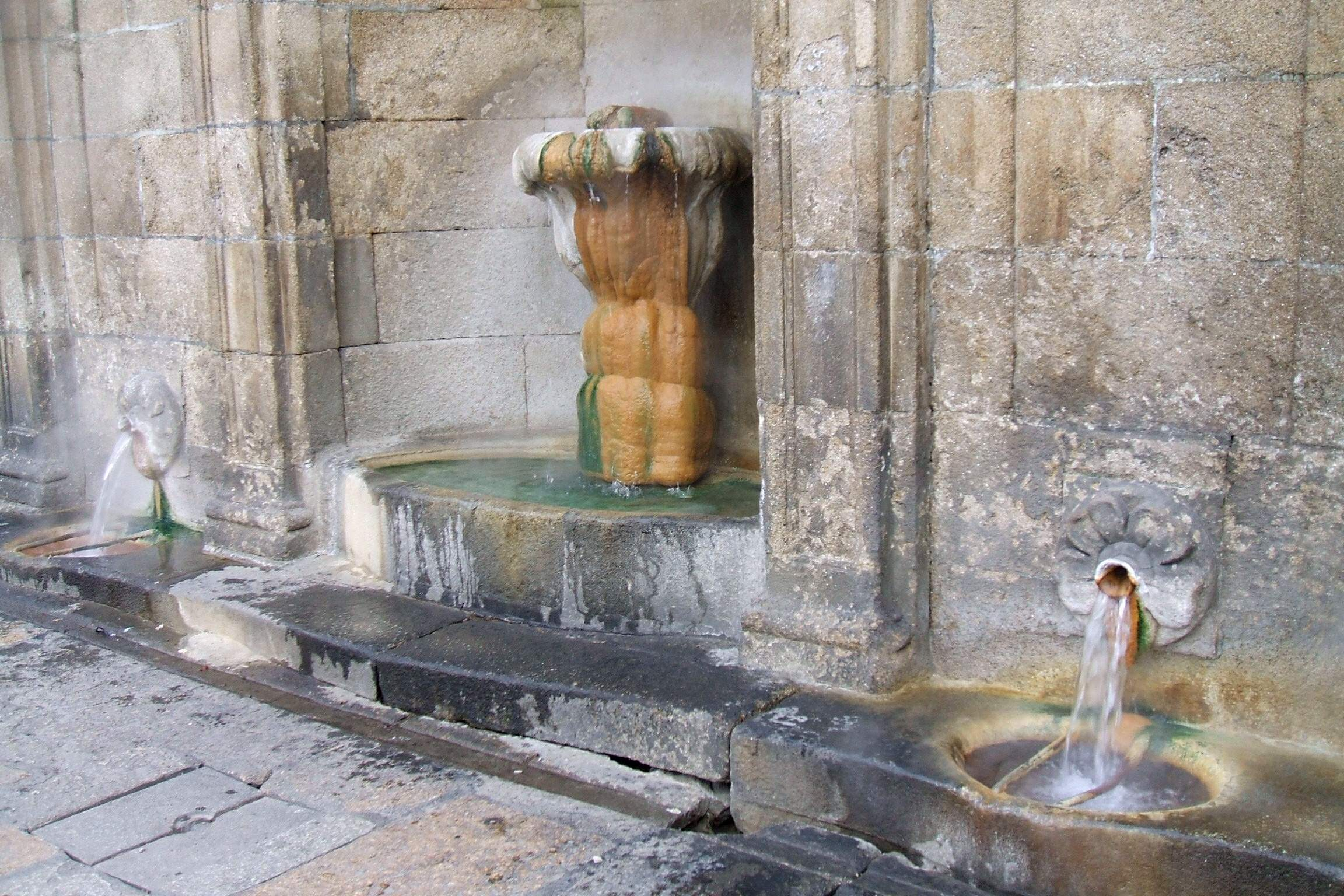 Orense - Fuente termal de Las Burgas